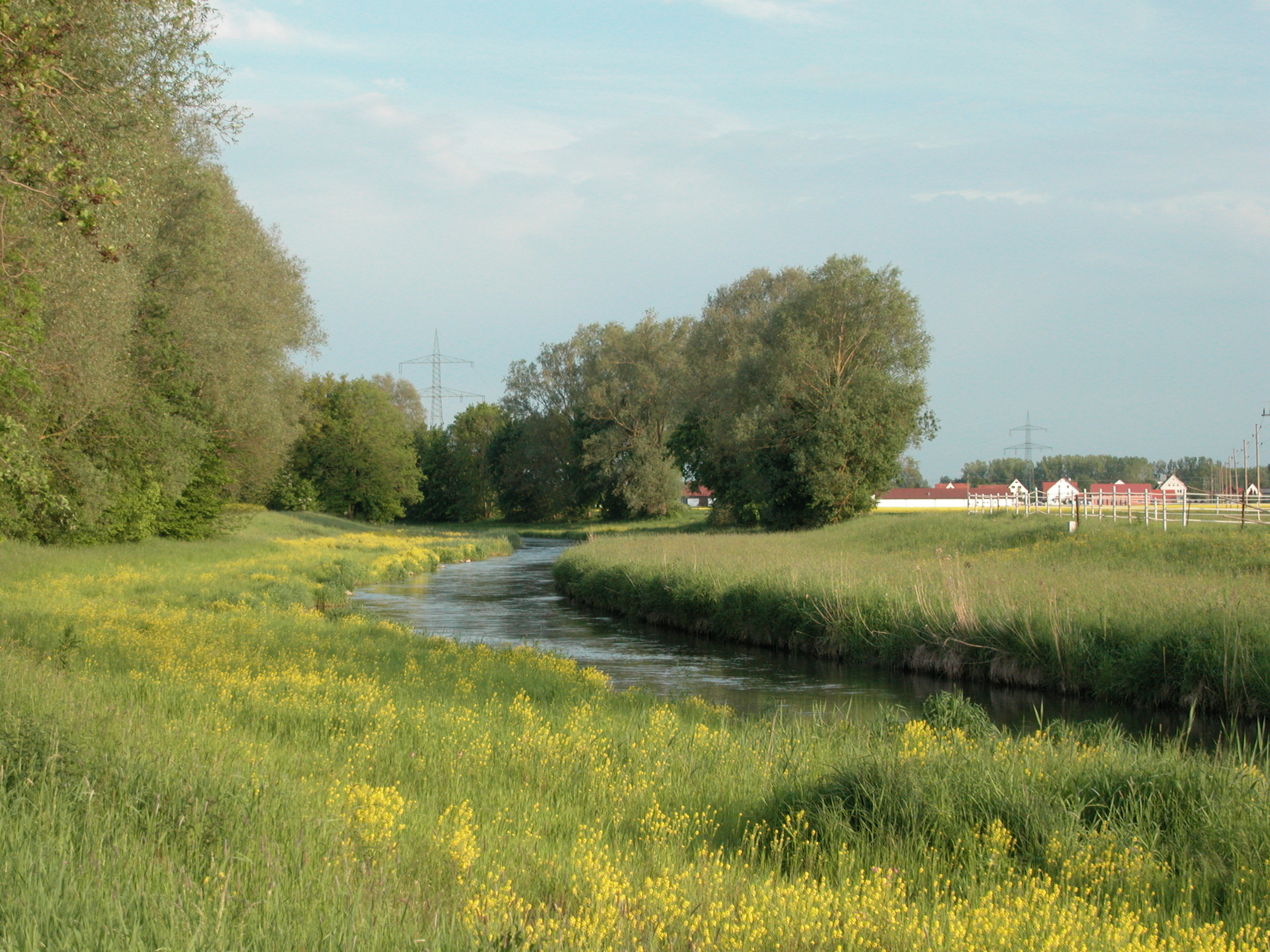 Die Schmutter bei Gablingen (Bezirk Schwaben, Bayern)